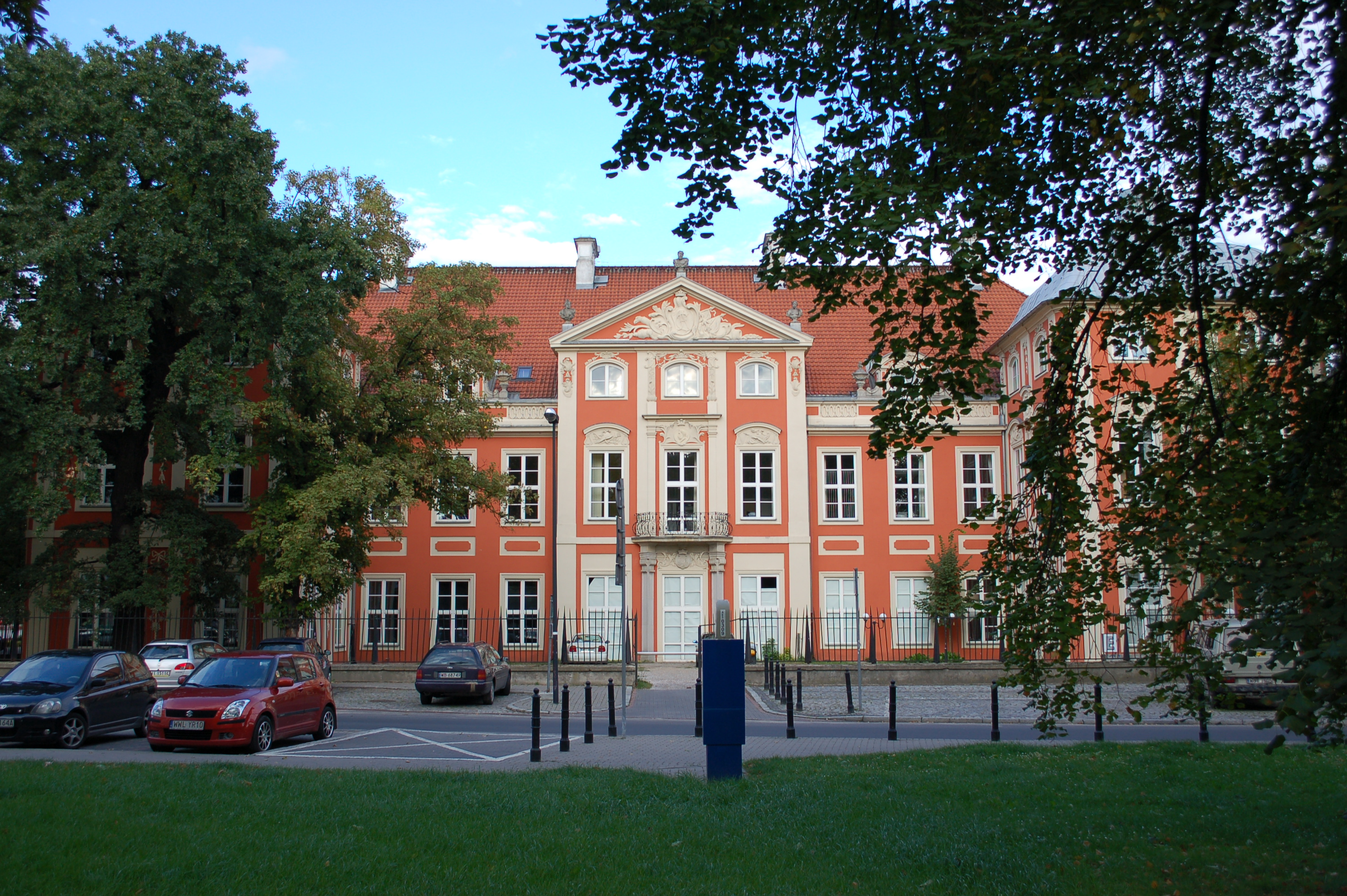 Czapski Palast, Akademie der schönen Künste in Warschau